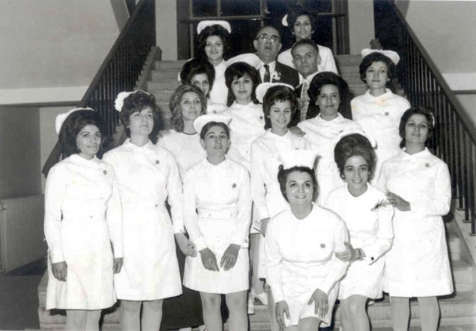 Higher Institute of Nursing Oil Company in Abadan